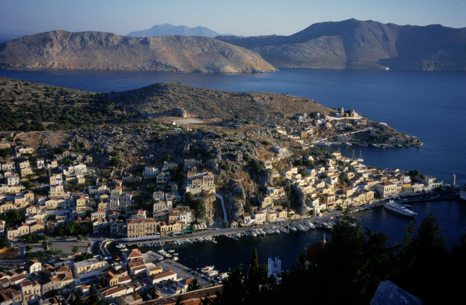 Blick über den Hafen von Simi, im Hintergrund ist das türkische Festland zu sehen (Halbinsel Datca)